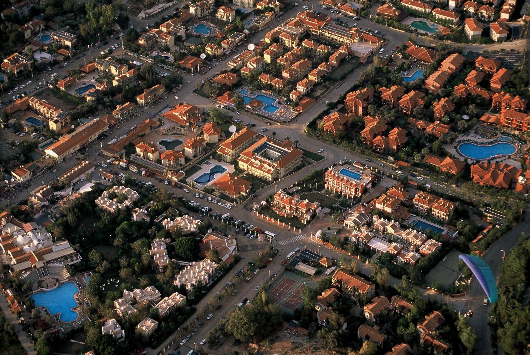 تصویر هوایی از هتلهای الی دنیز